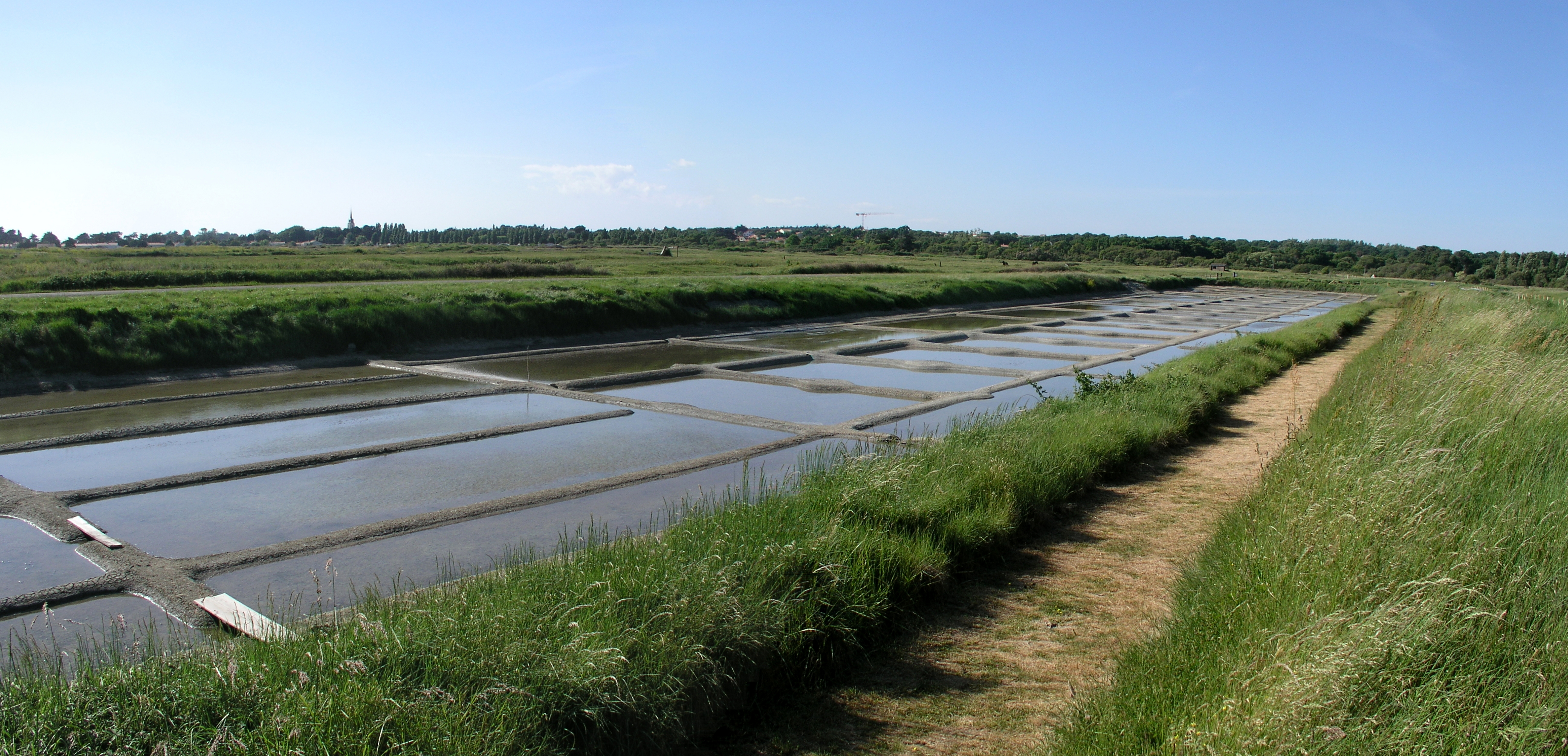 Marais salant dit tenue de Mareil aux Moutiers-en-Retz